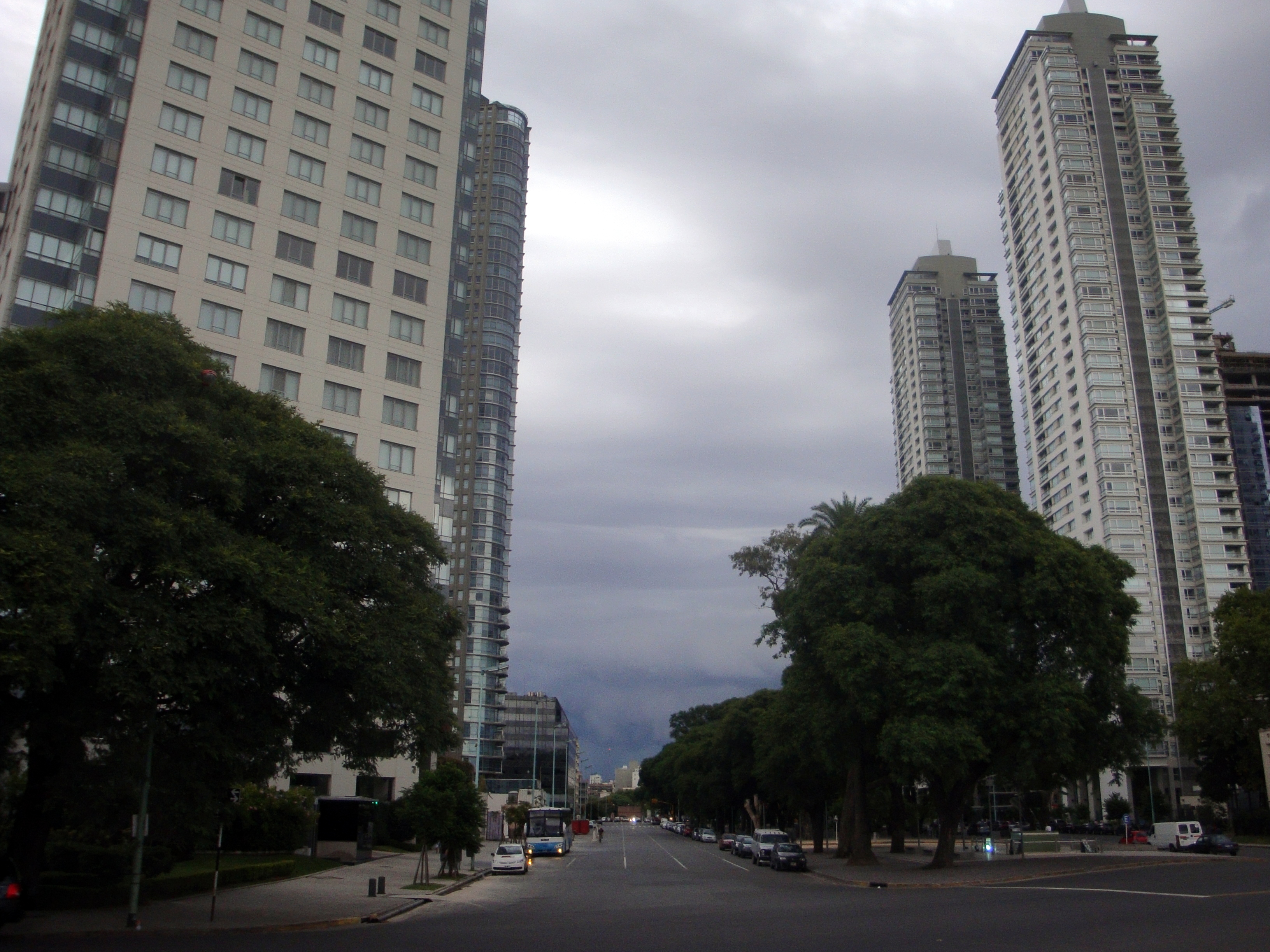 Vista de la calle Azucena Villaflor desde su intersección con Calabria, en el barrio porteño de Puerto Madero.